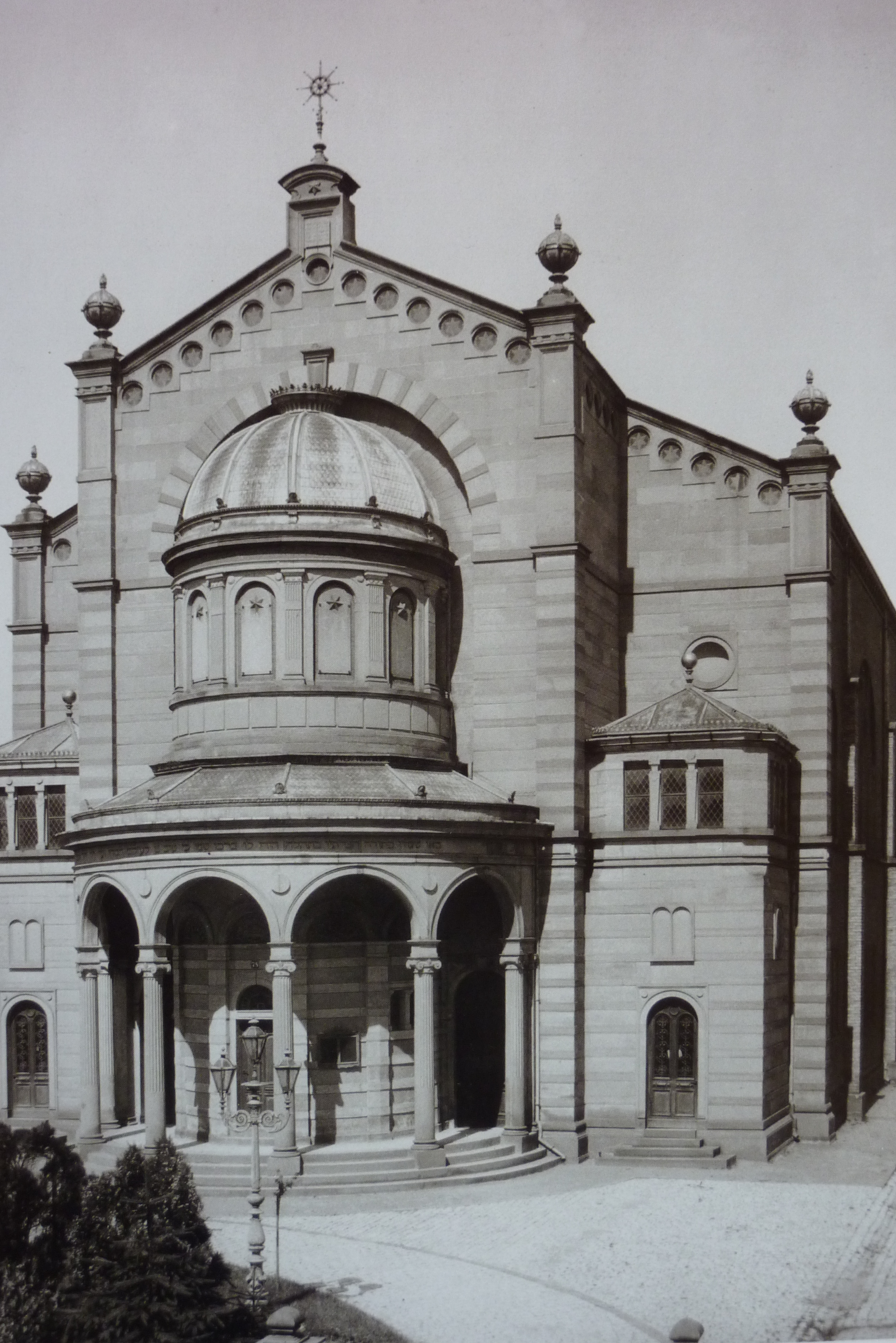 Synagoge in Bruchsal, erbaut 1880/81, Architekten: Jakob Henkenhaf und Friedrich Ebert (Architekt), zerstört